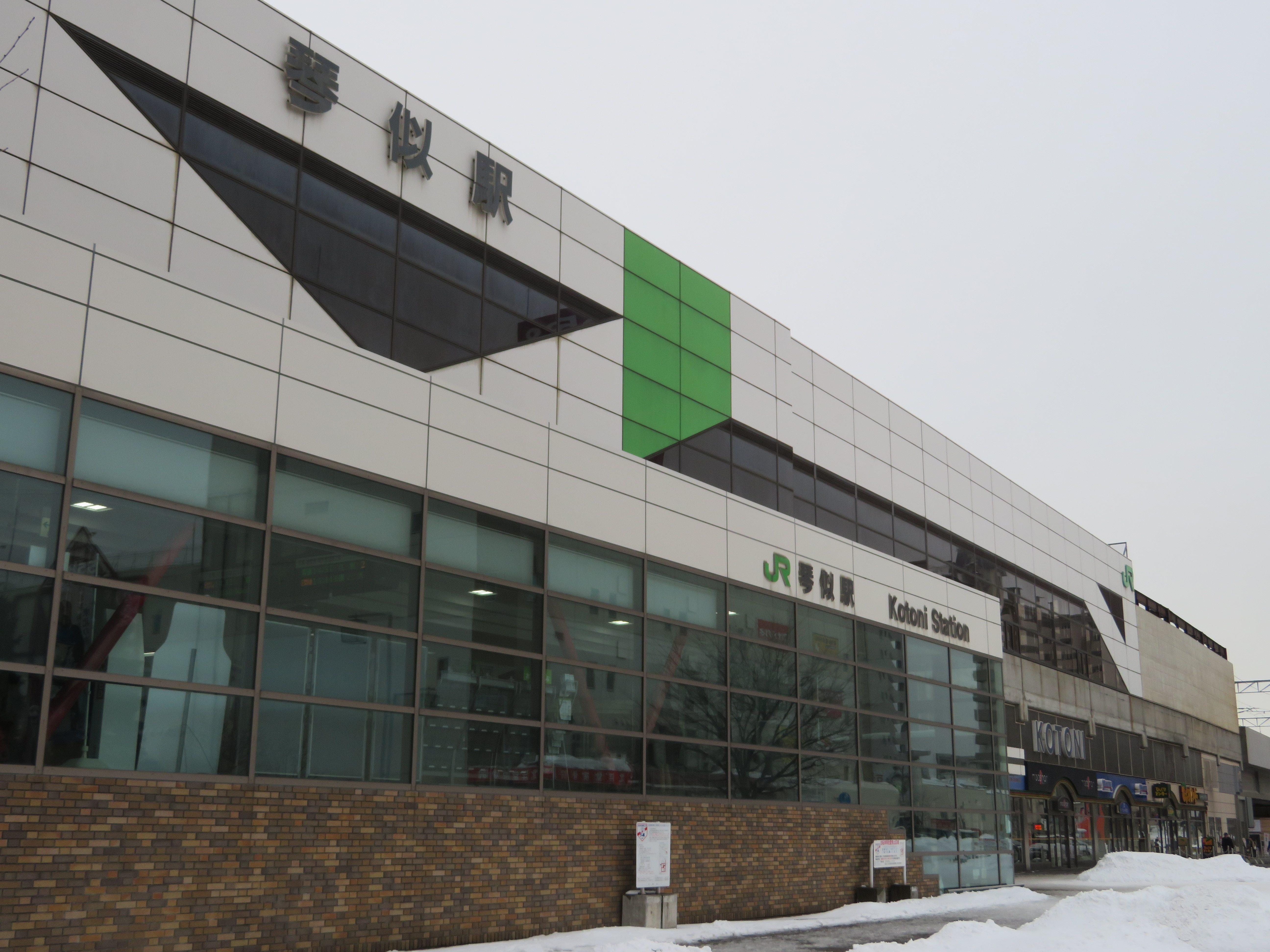 JR琴似駅駅舎 Canon PowerShot SX720 HS